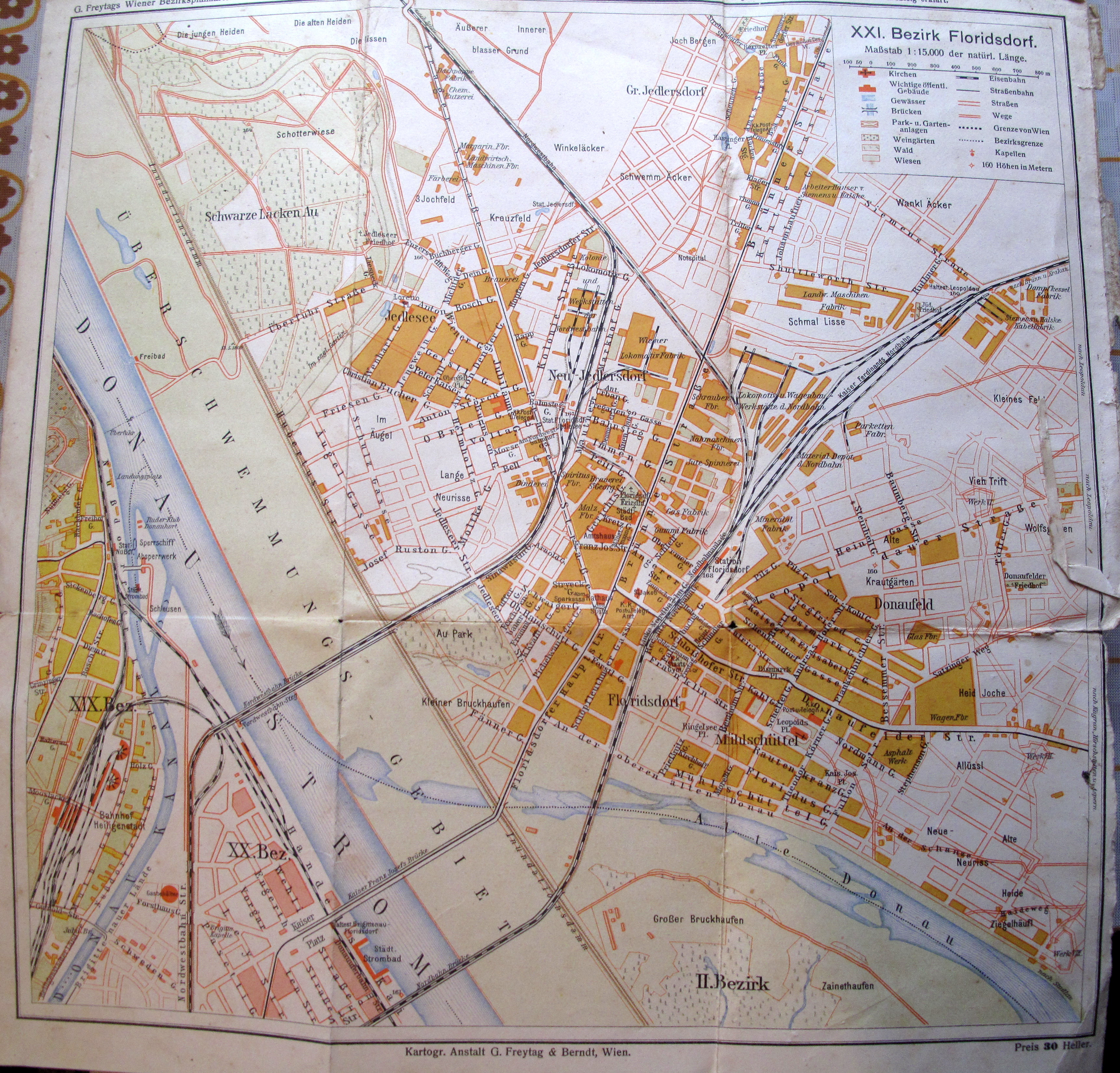 Reichshaupt- und Residenzstadt Wien: XXI. Bezirk Floridsdorf